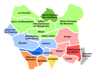 Carte de la Communauté d'agglomération de Villefranche-sur-Saône telle quelle sera au premier janvier 2014.